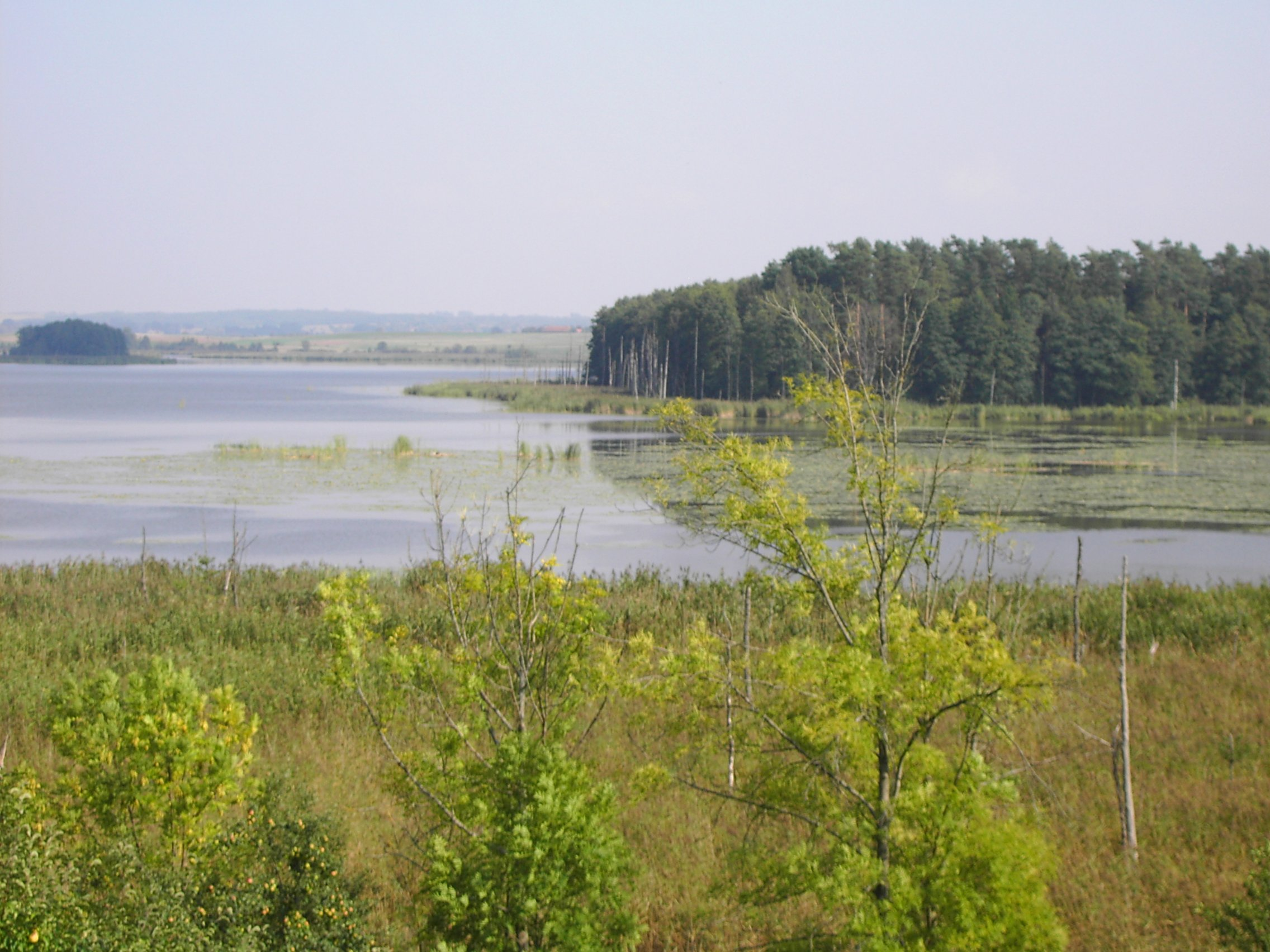 Rezerwat Oświn